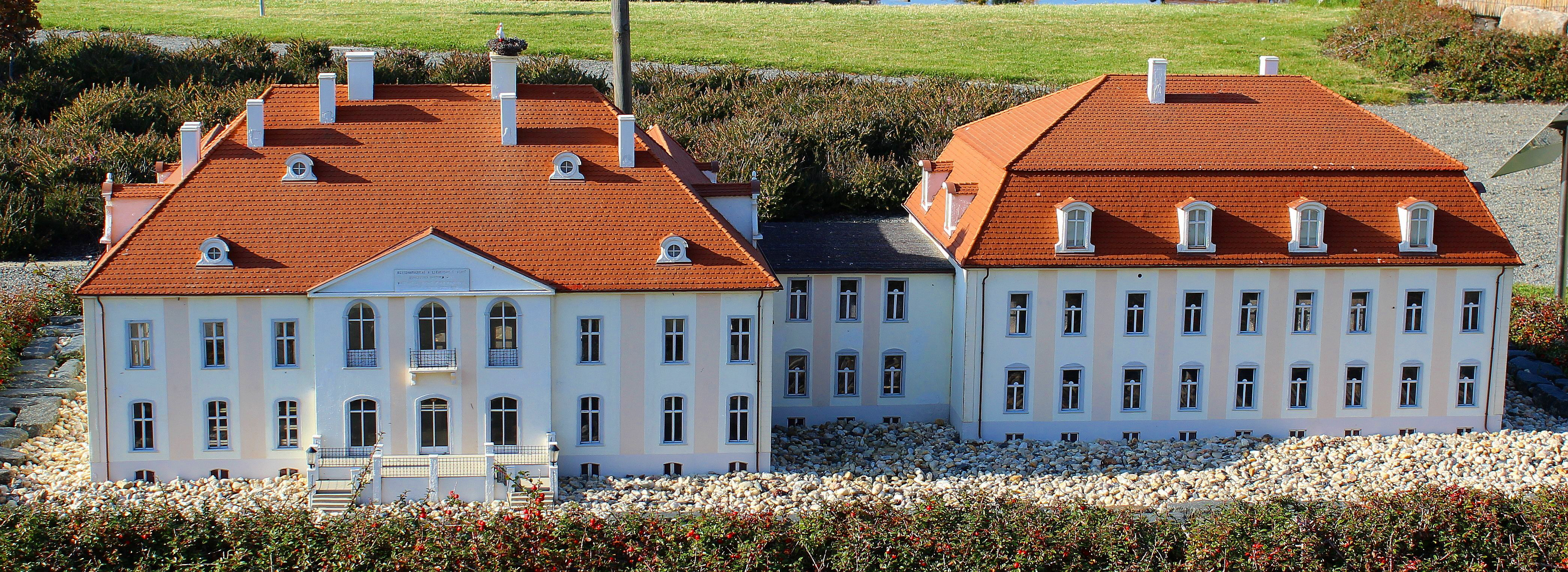 Das Modell des Schlosses Mückenberg im Miniaturenpark Elsterwerda.